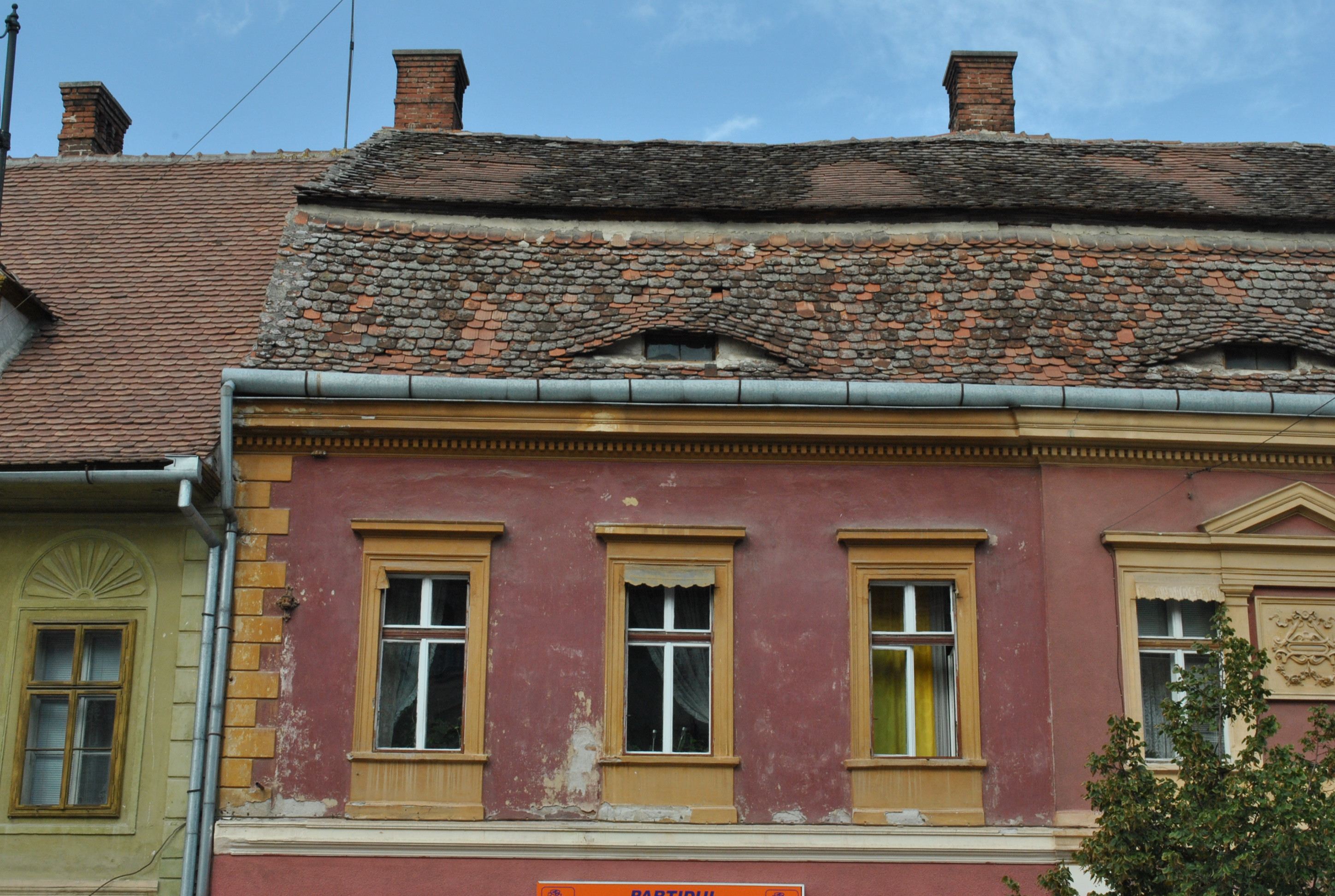 Casă, sf. sec. XVIII- înc. sec. XX